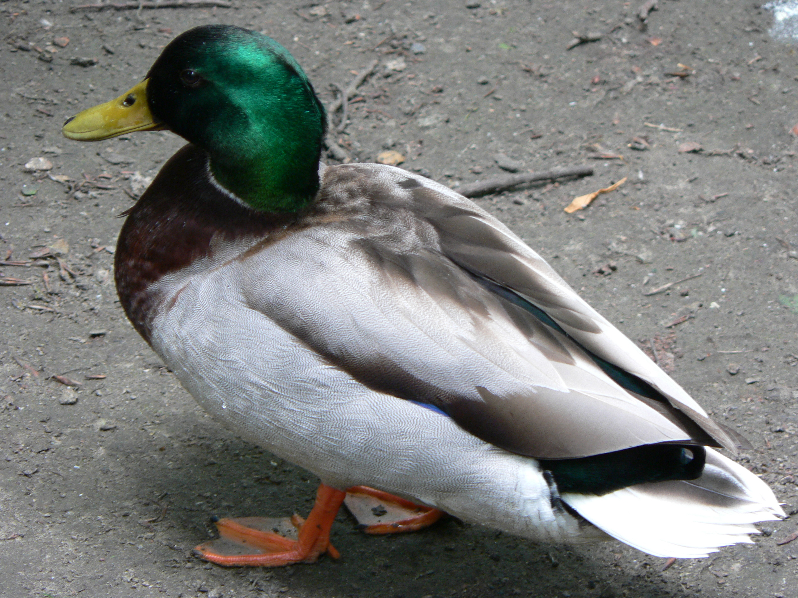 Male mallard duck, Boekenbergpark, Antwerpen, Belgium